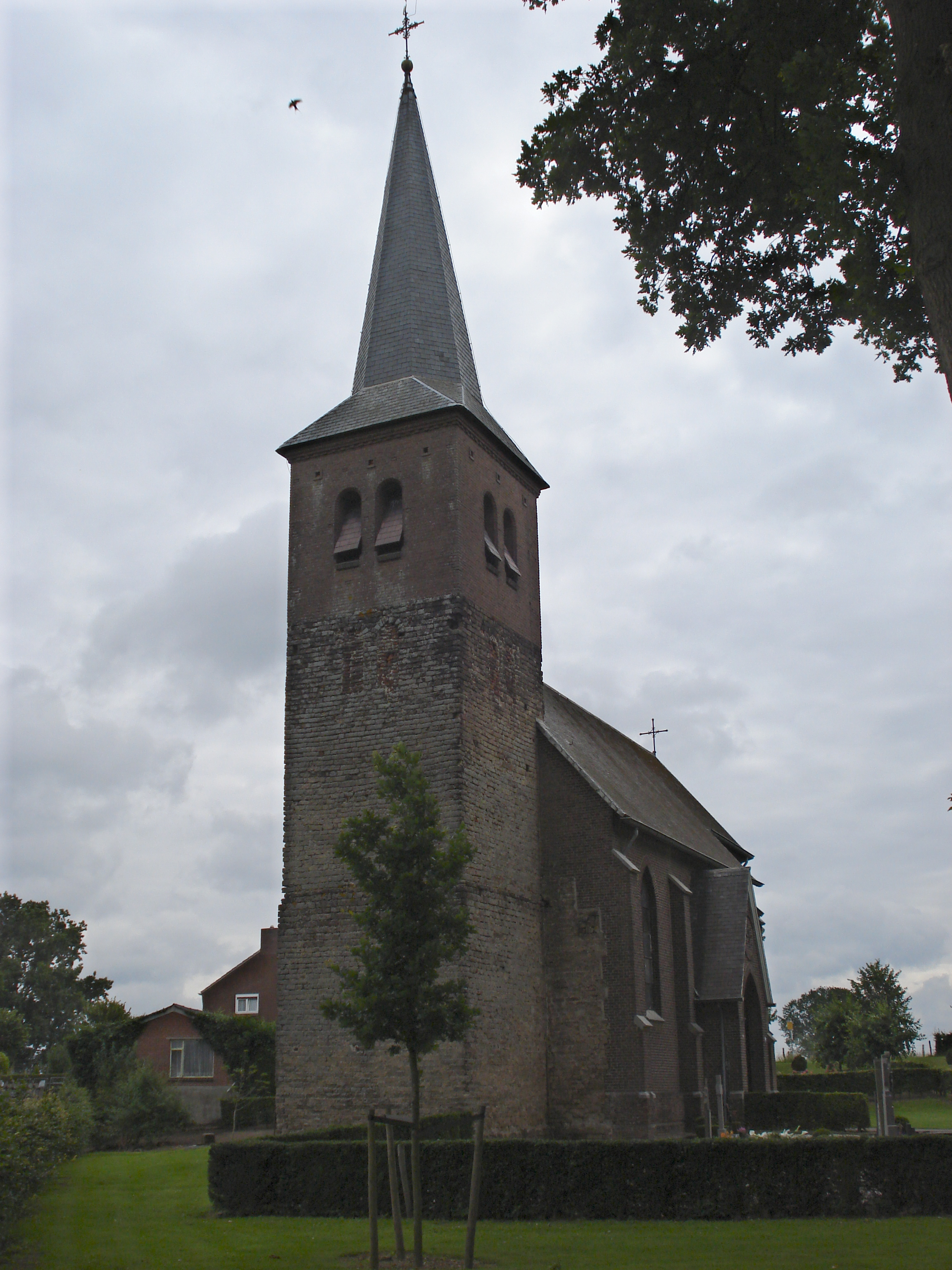 Neerlangel, l'église, la partie en tuf est du XIème